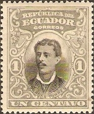 Stamp Number SG193